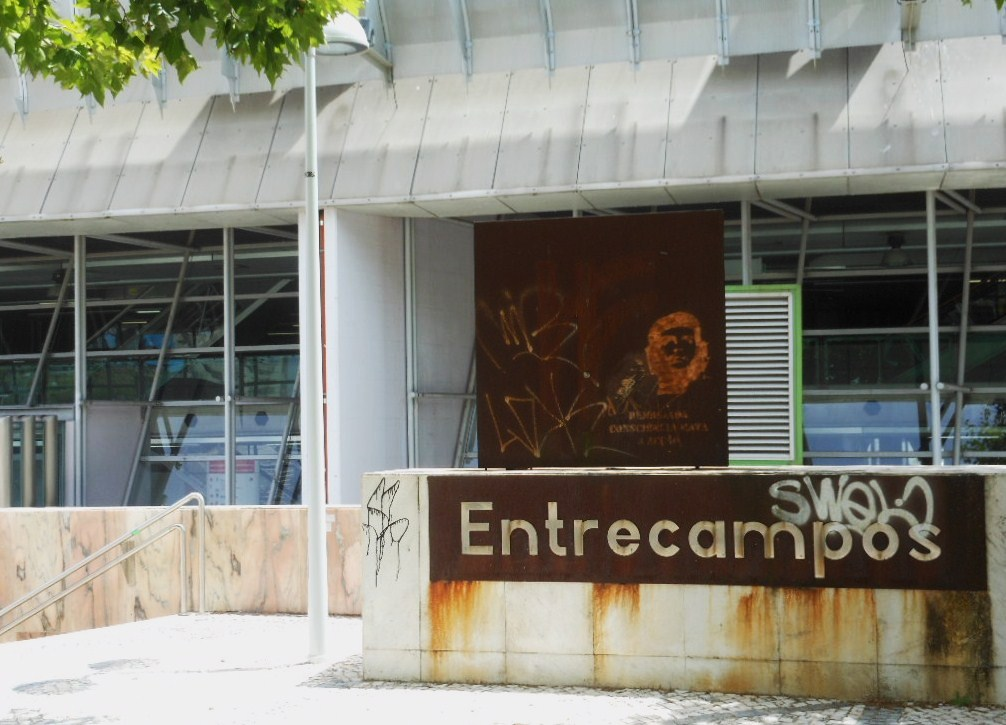 Entrecampos Subway